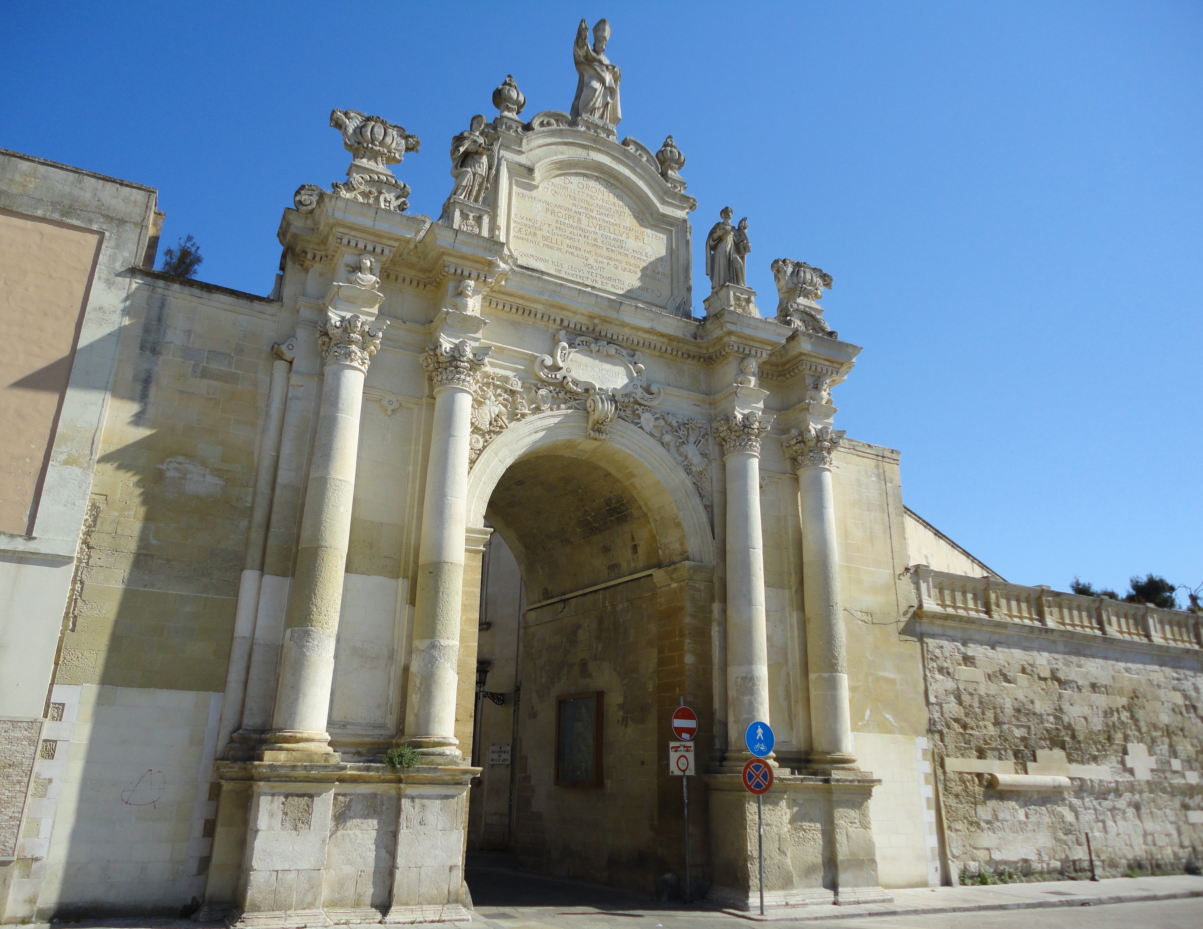 Porta Rudiae a Lecce